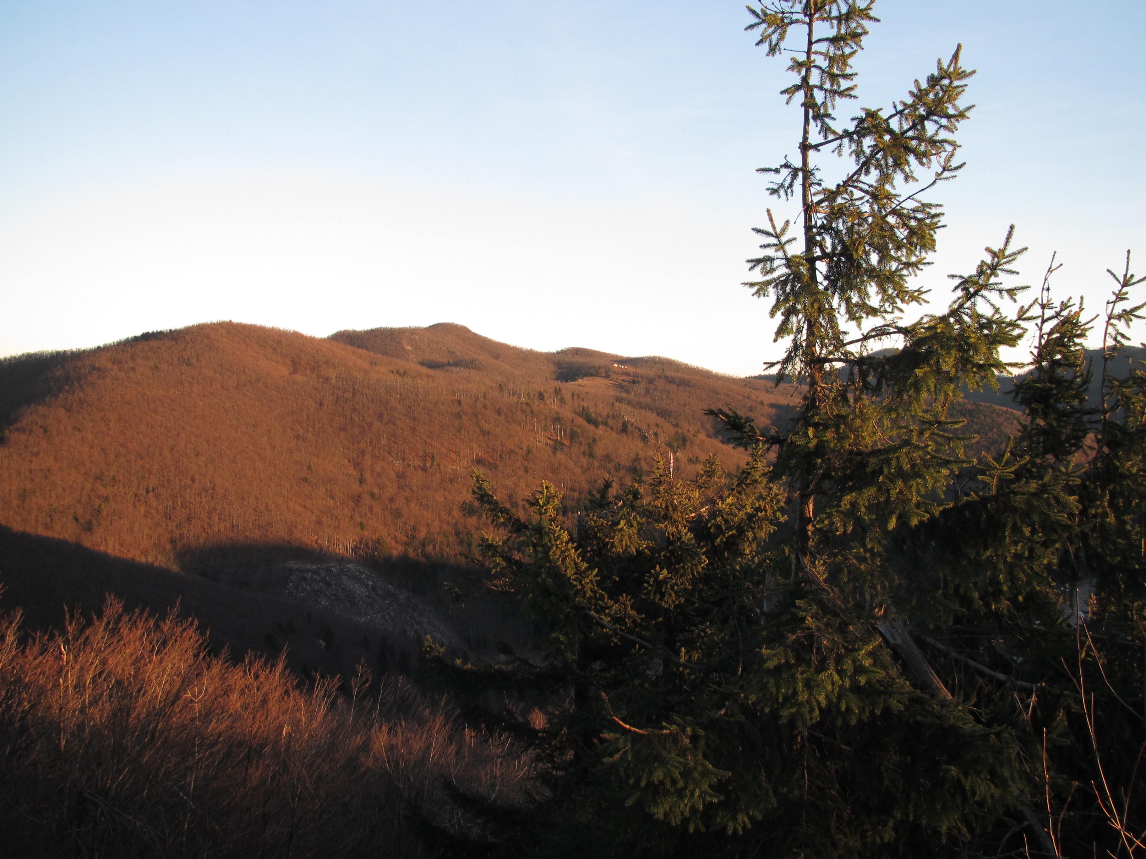 Pogled na katastrsko občino Javornik iz Zajcevega griča (Čertež, Strmec). Viden je SZ del Javornika. Obisk Zajčevega griča.